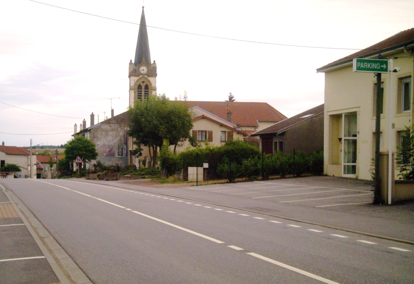 Champenoux rue principale